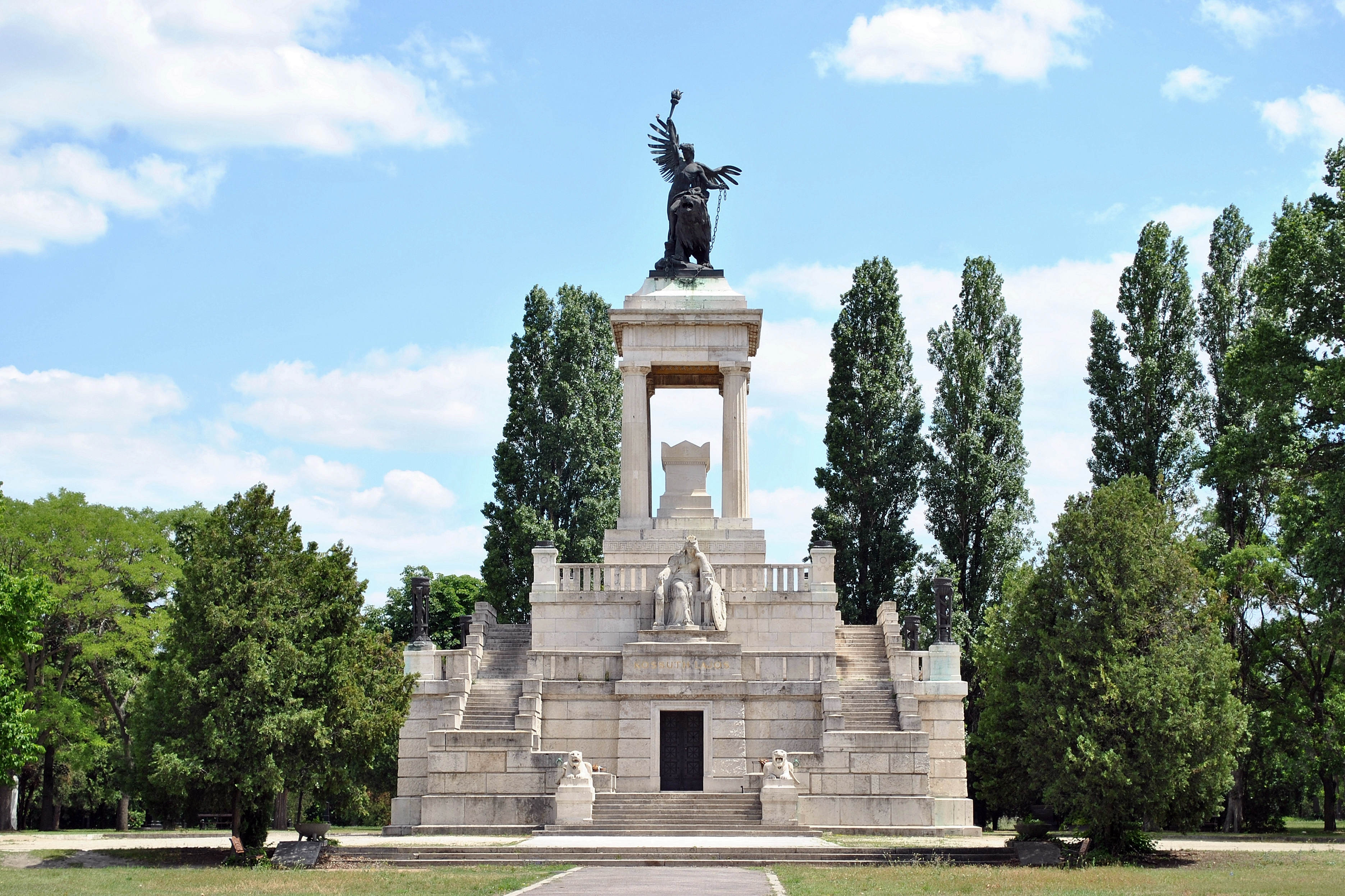 a temető egész területe az állami tulajdonú védett síremlékekkel együtt This is a photo of a monument in Hungary. Identifier: 90002